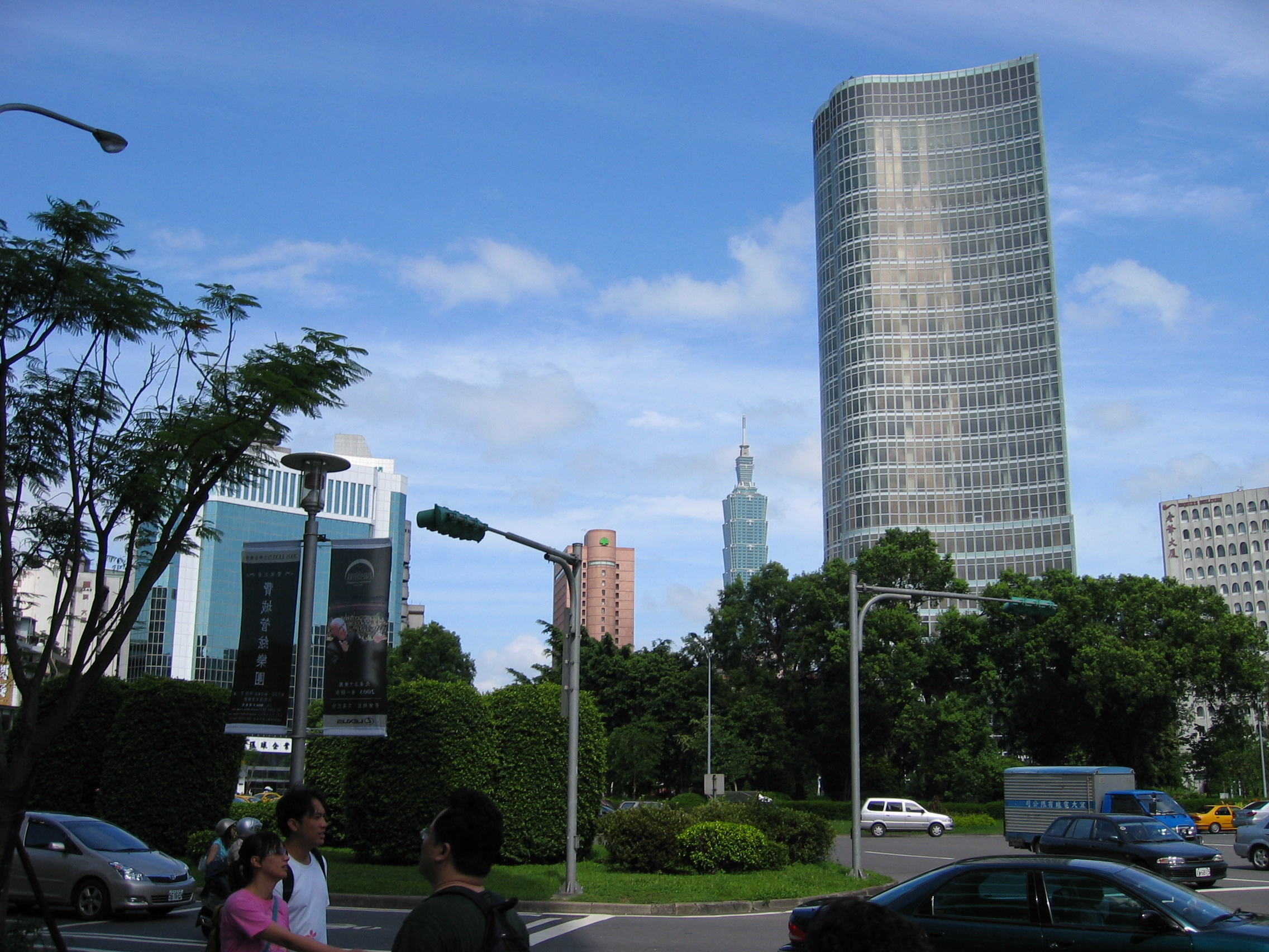 中文（台灣）: 臺北市大安區仁愛敦化圓環。